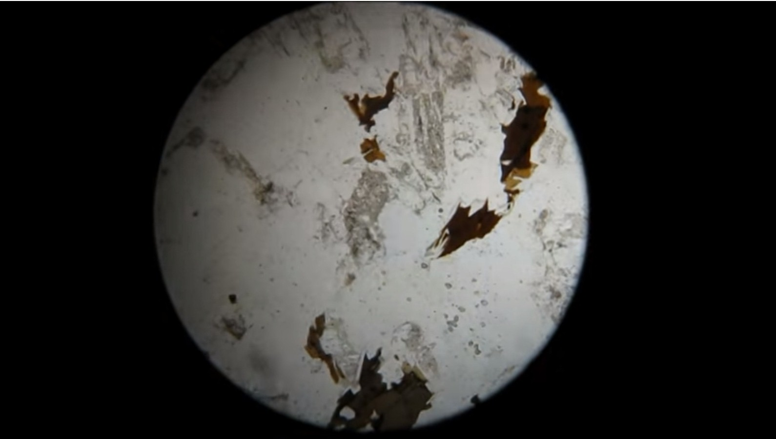 Granite under Polarized light